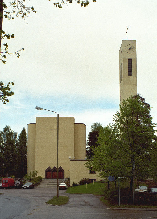 Varkauden kirkko kuvattuna kaupungin keskustan suunnasta